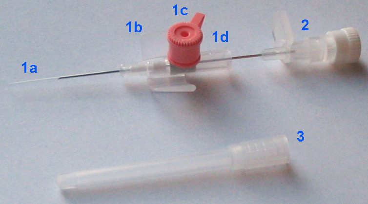 Venenverweilkanüle (1) mit (1a) Venenkatheter (1b) Flügeln zum Fixieren mit Pflaster (1c) Einspritzventil in Farbcodierung der Kanülengröße (hier 20G) (1d) Luer-Lock-Anschluss für ein Infusionssystem (2) Stahlmandrin (halb zurückgezogen) (3) Schutzkappe